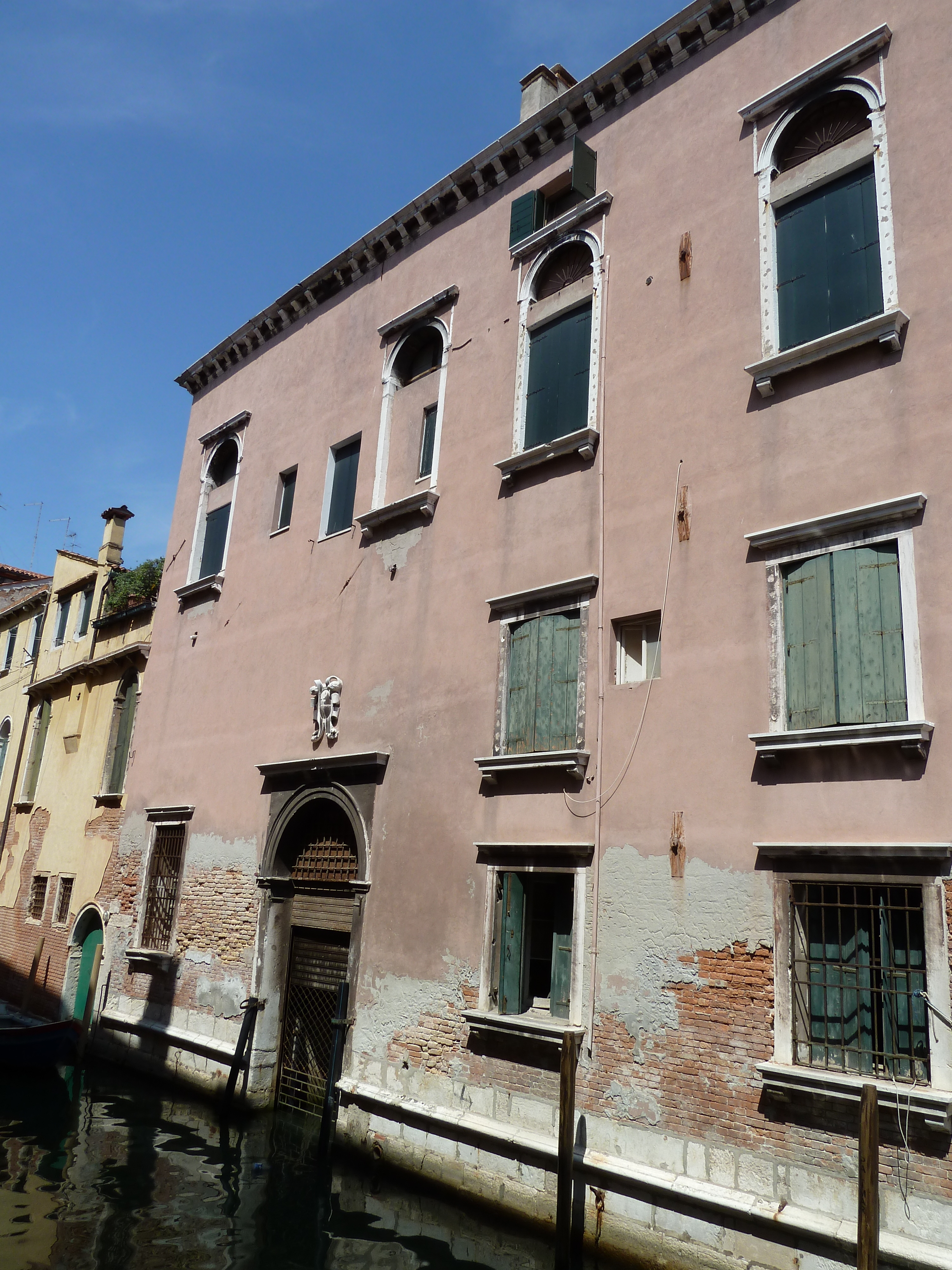 Pal nunziature o gritti